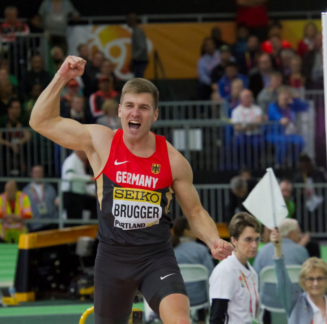 264 brugger